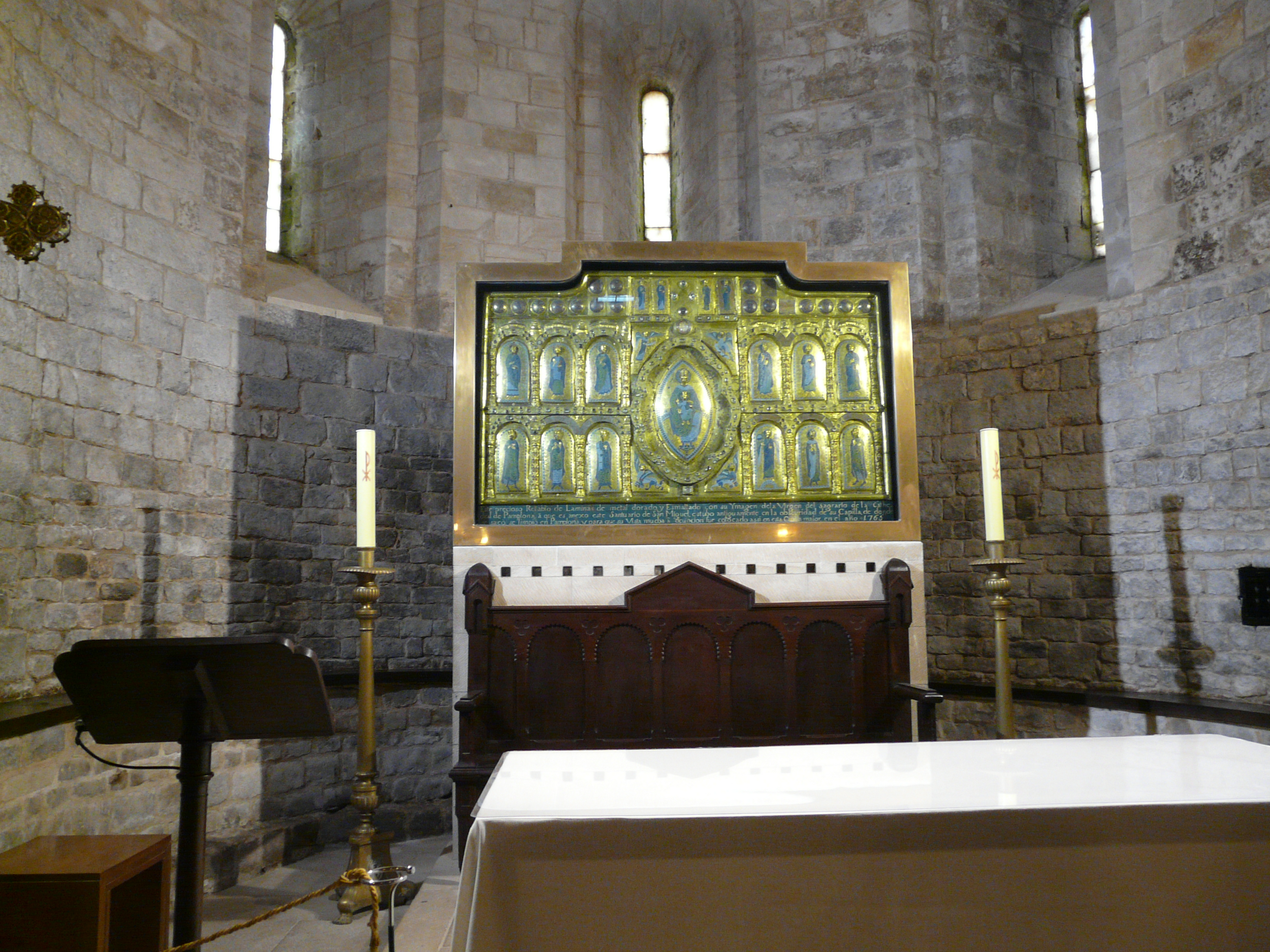 Santuari de Sant Miquel d'Aralar